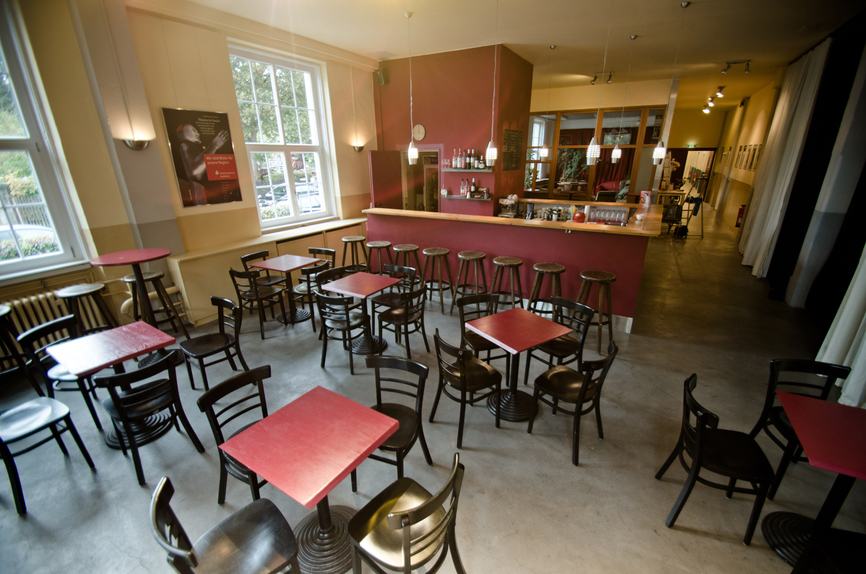 S’ensemble Theater Bar, rechts Bühne (nicht zu sehen).